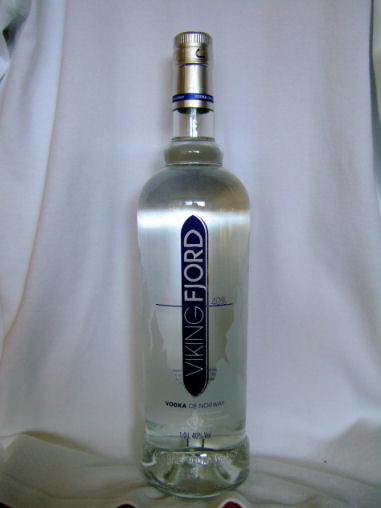 Vikingfjord Norwegian Vodka